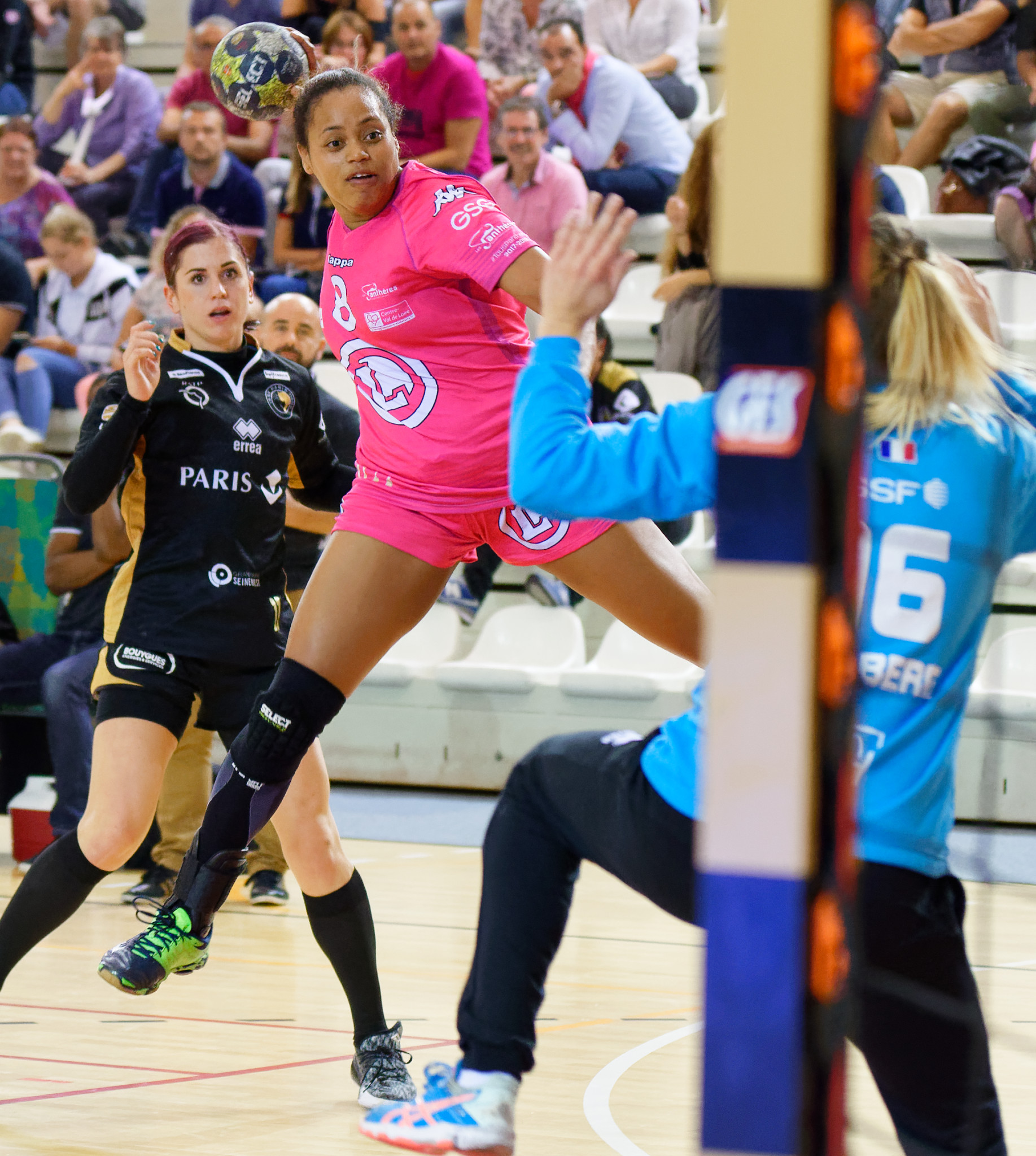 Melissa Agathe lors de la rencontre Issy Paris / Fleury. Le 03 septembre 2017 à Issy Les Moulineaux.